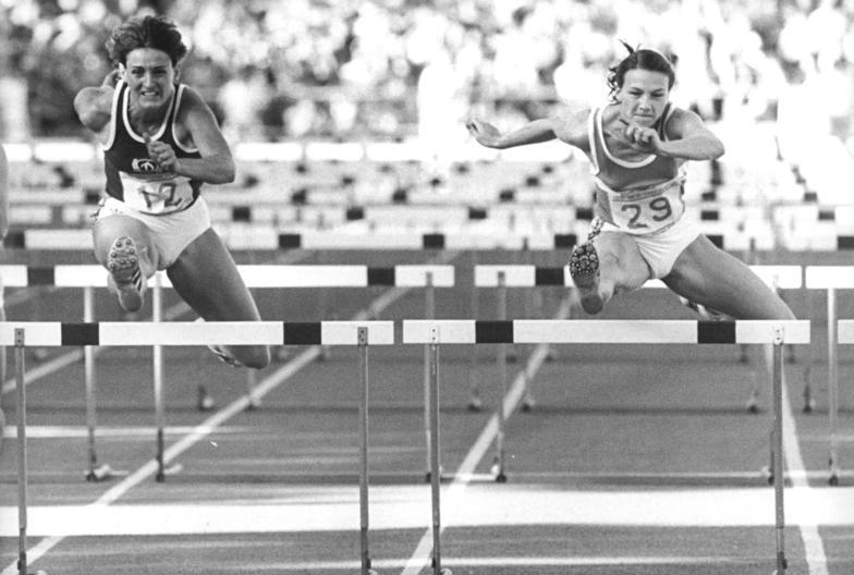 Cornelia Oschkenat, Gloria Uibal ADN-ZB Koard 20.8.87 Potsdam: 38. DDR-Leichtathletik-Meisterschaften - Zum Auftakt der Wettkämpfe im Stadion Luftschiffhafen gab es eine Überraschung im 100-m-Hürdenlauf. Die Cottbuserin Gloria Uibal (r.) schlug mit 12,55 s in ihrer persönlichen Bestzeit die Favoritin Cornelia Oschkenat (SC Dynamo Berlin, l.), die 12,56 erreichte.